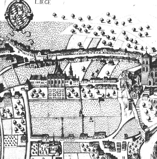 Fragment de gravure du XVIIème siècle représentant le quartier Saint-Laurent de Liège, avec l'abbaye de Saint-Laurent et la collégiale Saint-Martin.